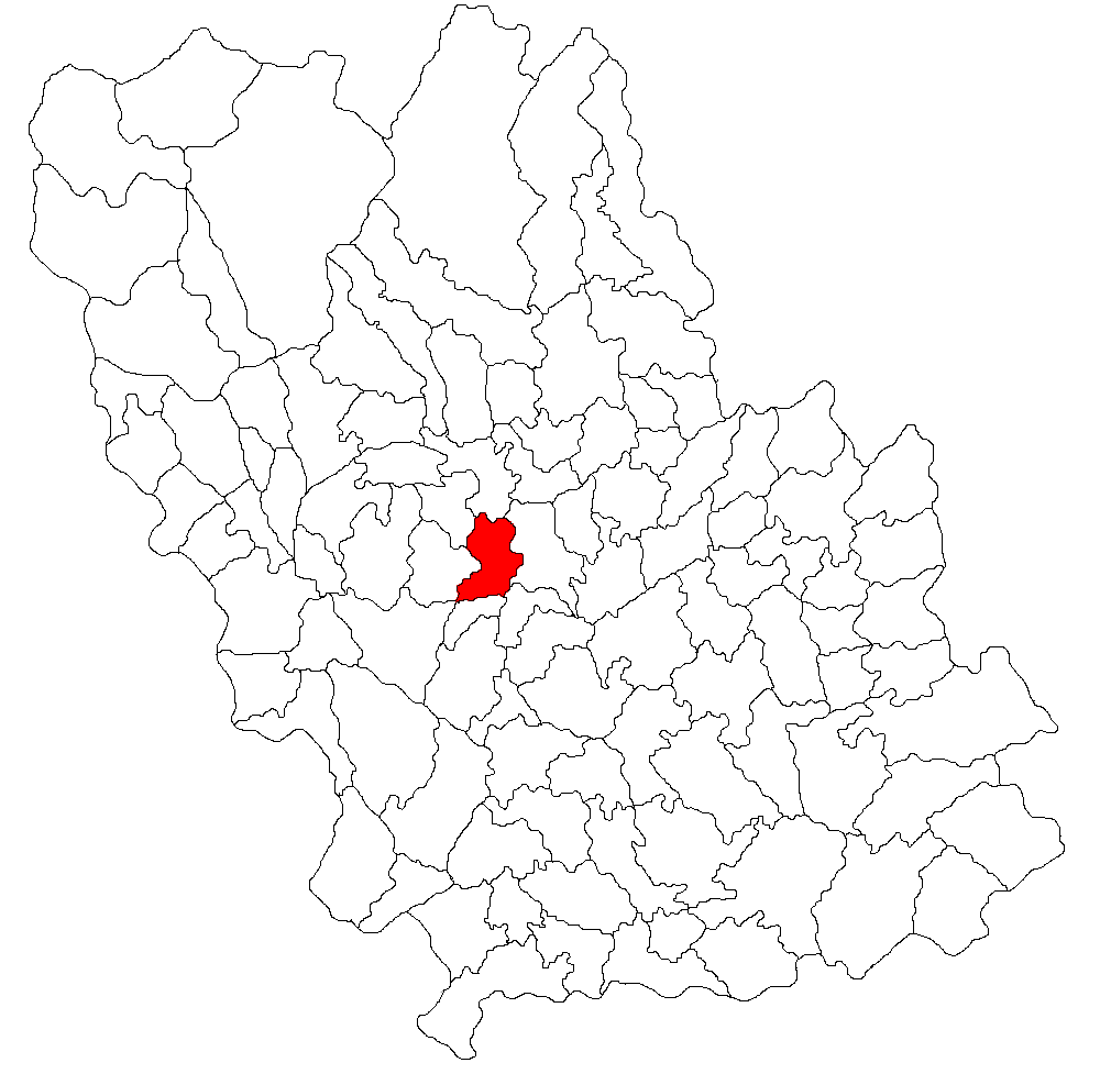 Categorie:Hărţi ale judeţului Prahova